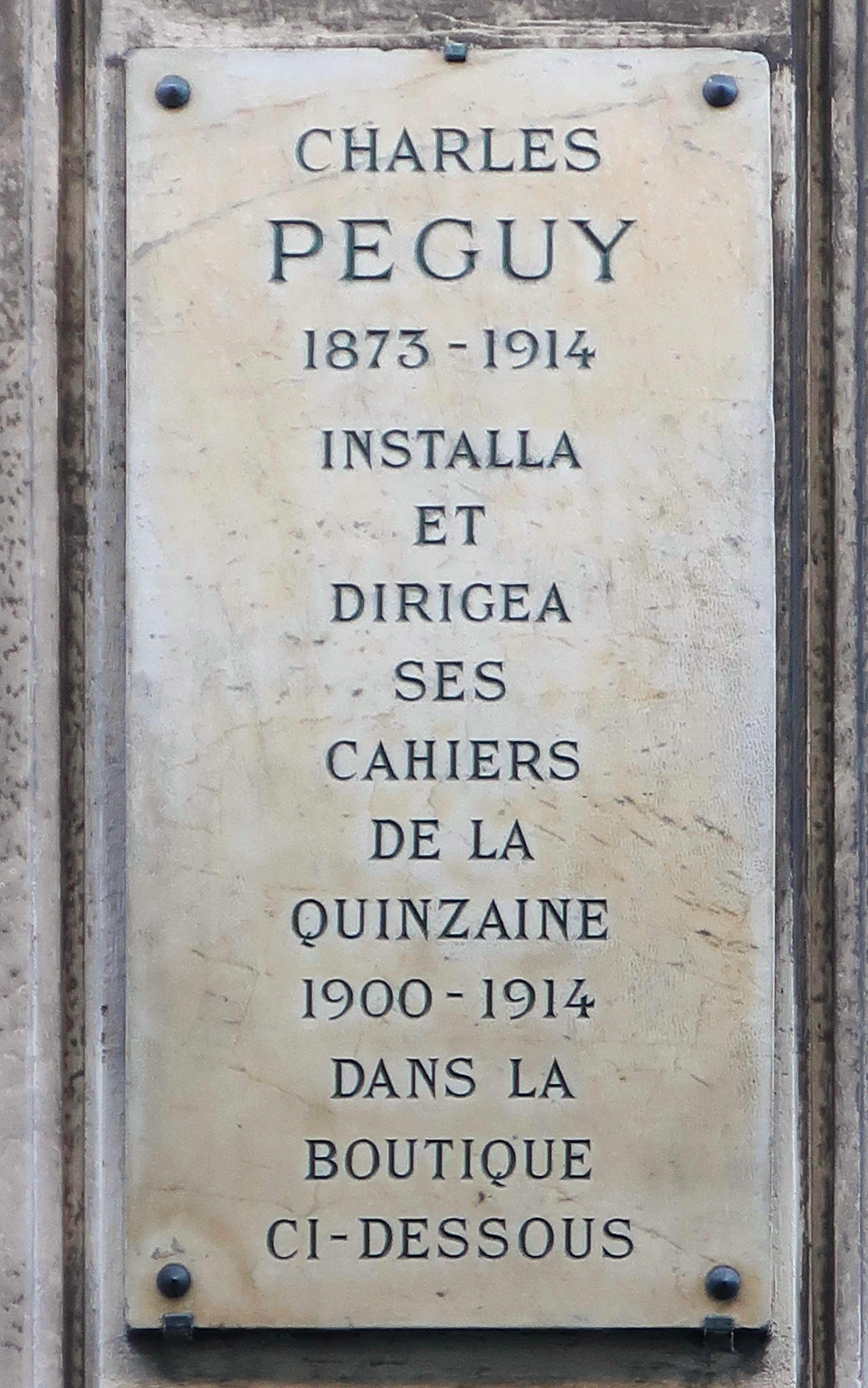 Plaque en hommage à Charles Péguy, au 8 rue de la Sorbonne (Paris, 5e), où il installa et dirigea ses Cahiers de la quinzaine de 1900 à 1914.